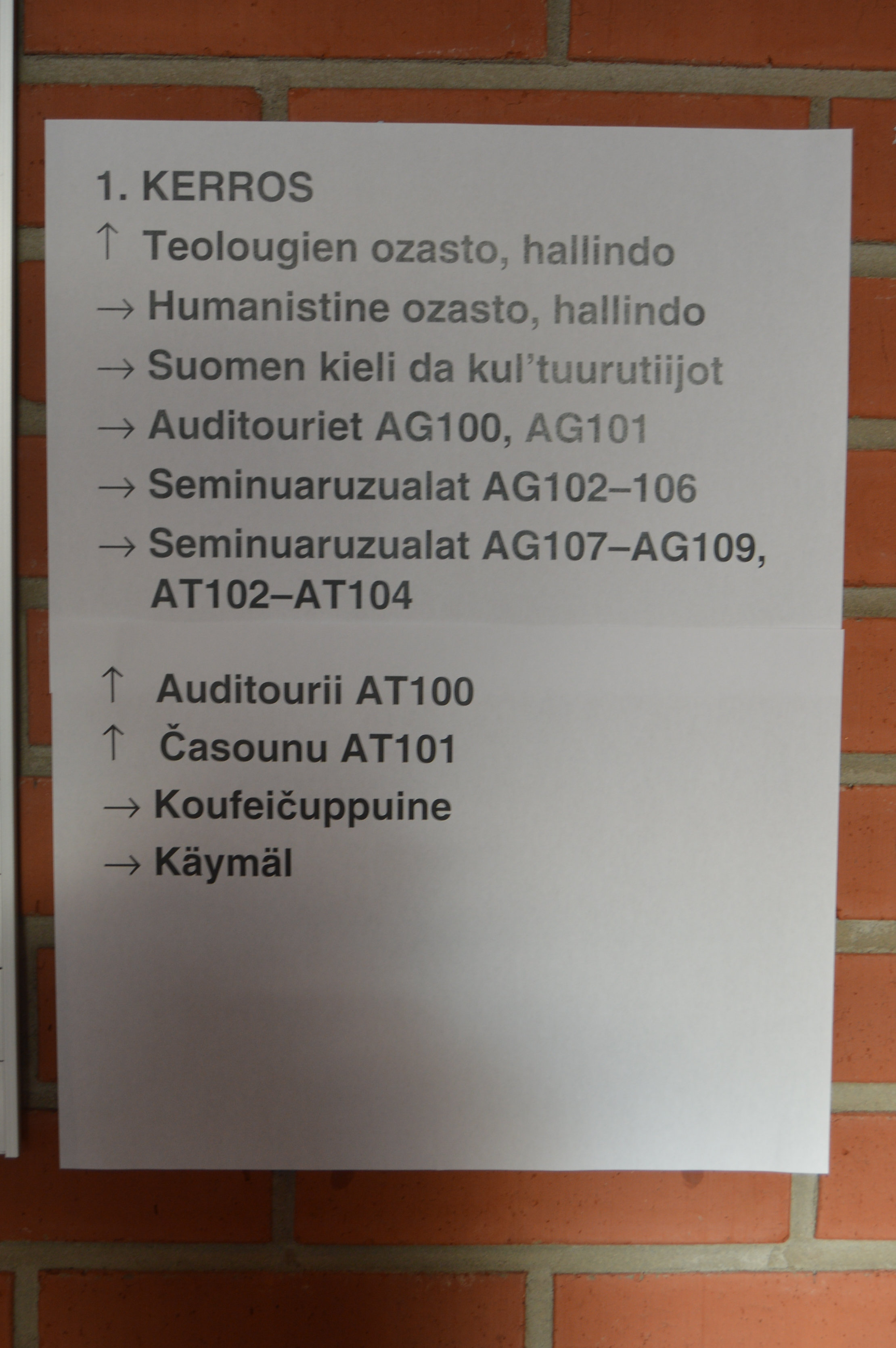 Karjalankielinen opaskyltti Itä-Suomen yliopiston Joensuun kampuksella.